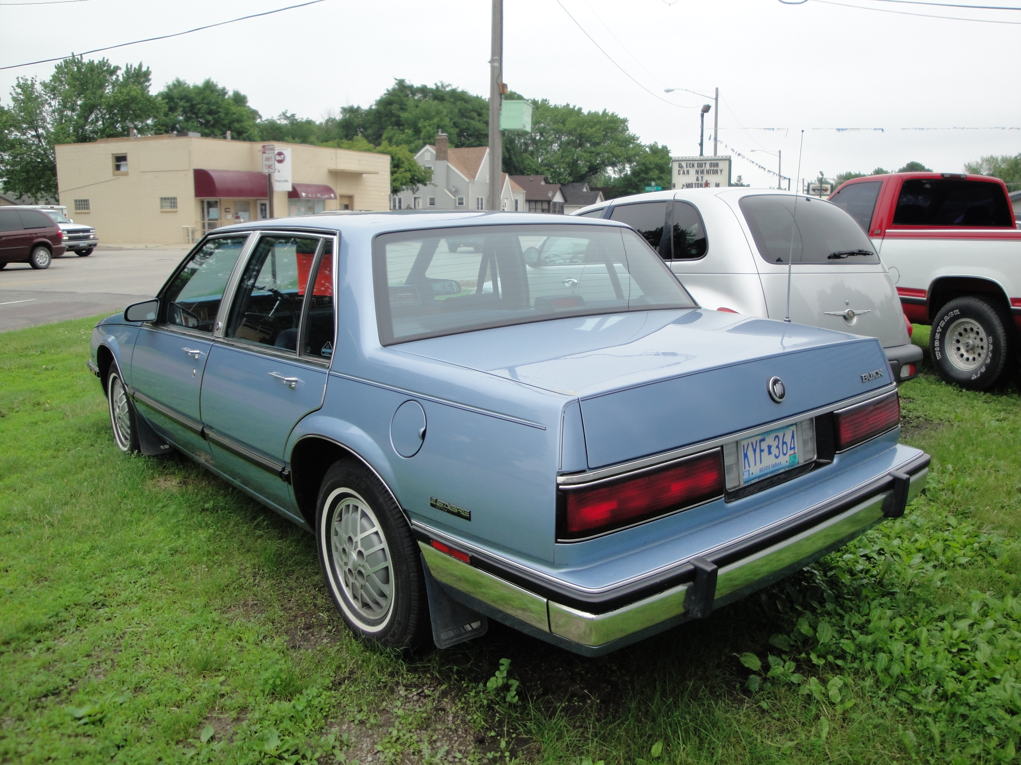 Owatonna, Minnesota